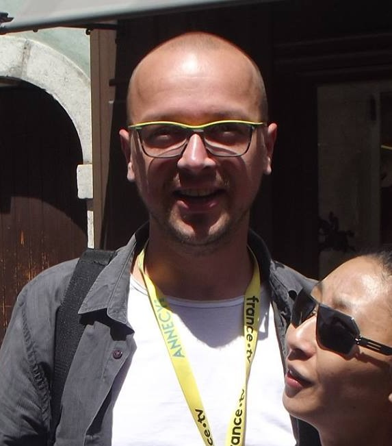 Bastien Dubois au festival international du film d'animation d'Annecy 2018.